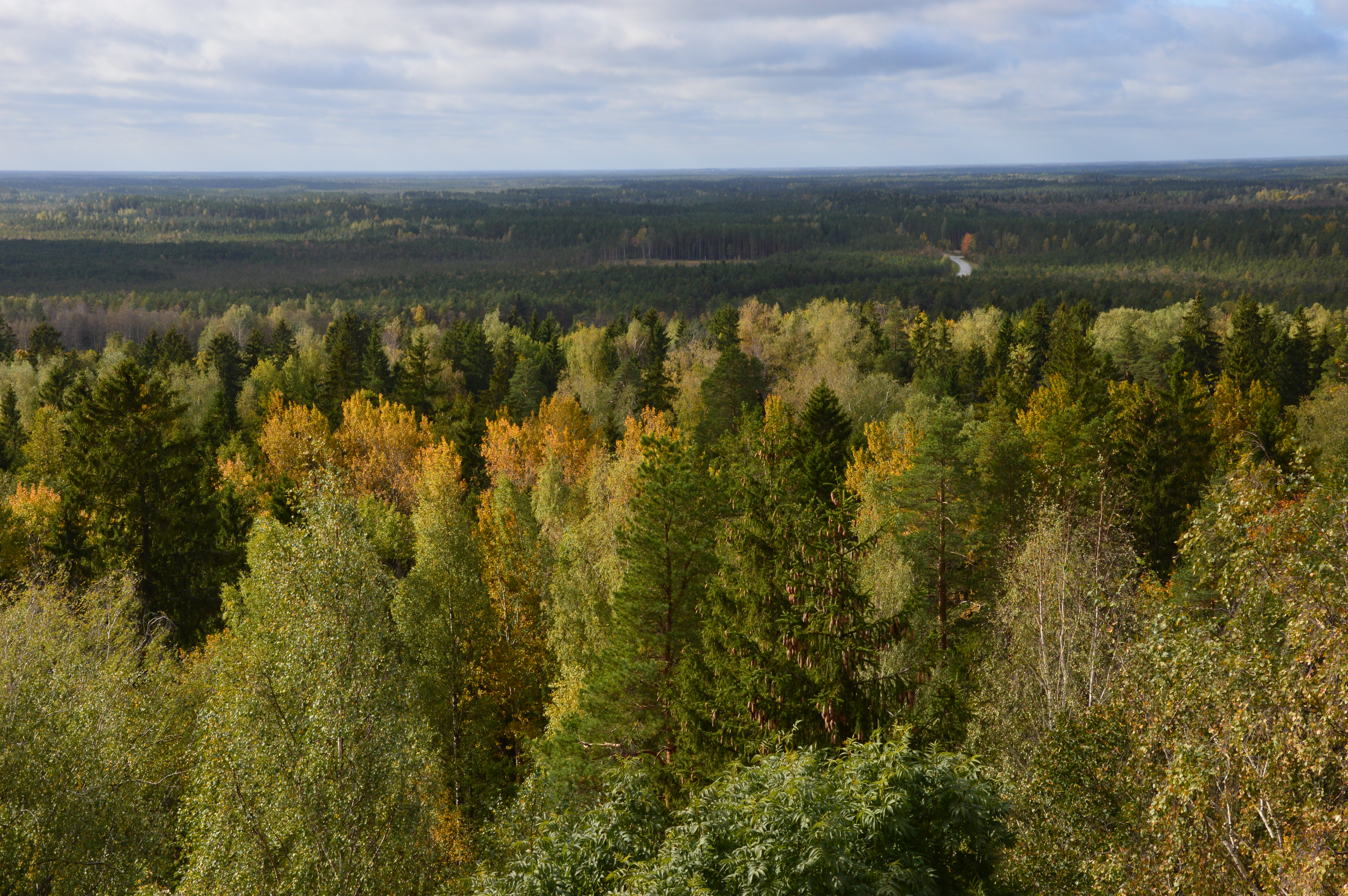 Vaade Iisaku vaatetornist.